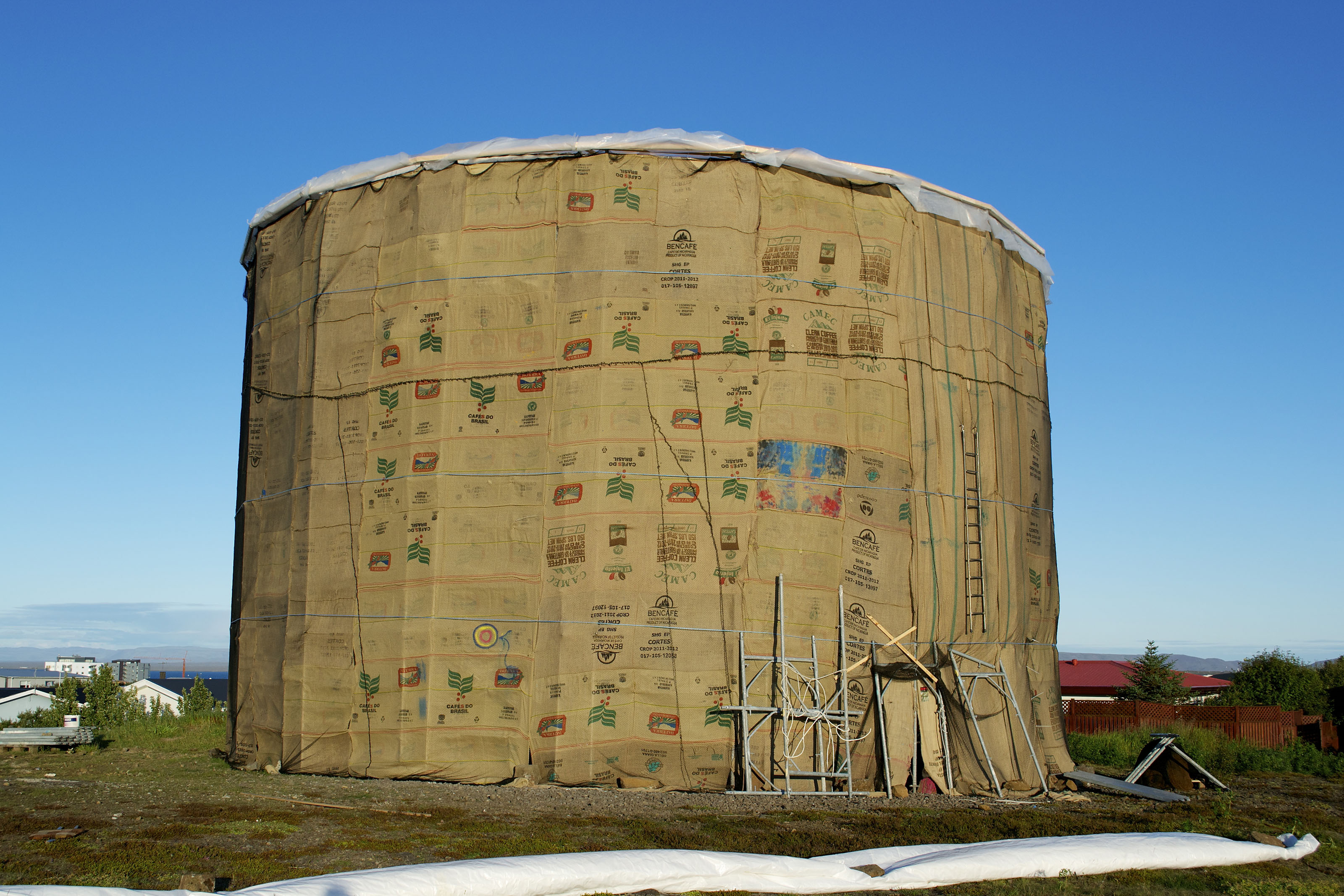 Watertoren Keflavik ingepakt in koffiezakken